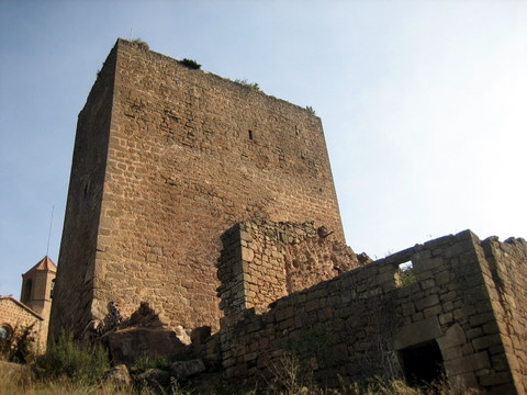 Castell de Riner a la comarca del Solsonès - Catalunya